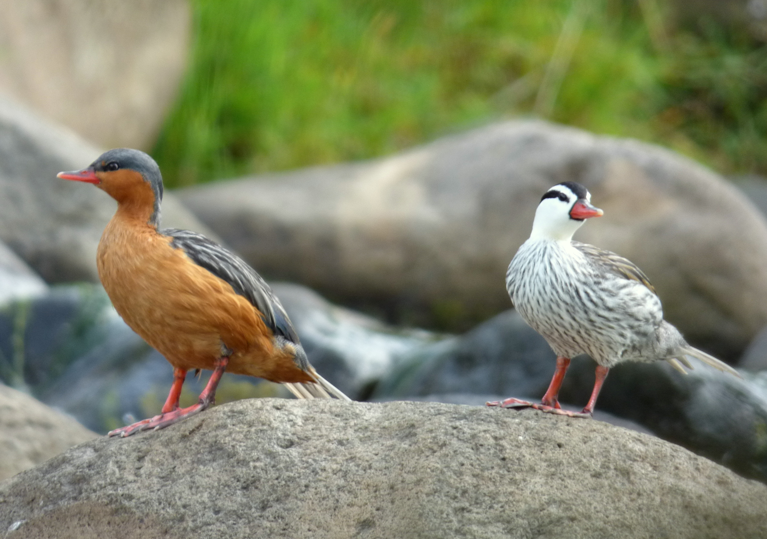 Merganetta armata (Pato de torrentes) - Pareja